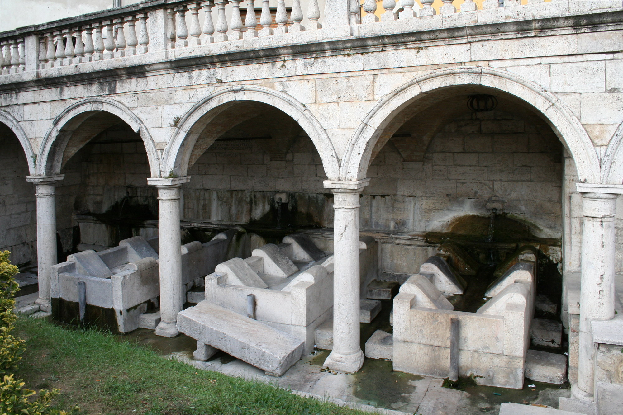 Lavatoio pubblico di Ascoli Piceno, esterno giorno, proprio scatto Sibilla.io "Utilizzo concesso" Ticket#2007040410014627 (ticket per le immagini) This file is licensed under Creative Commons 3.0 license